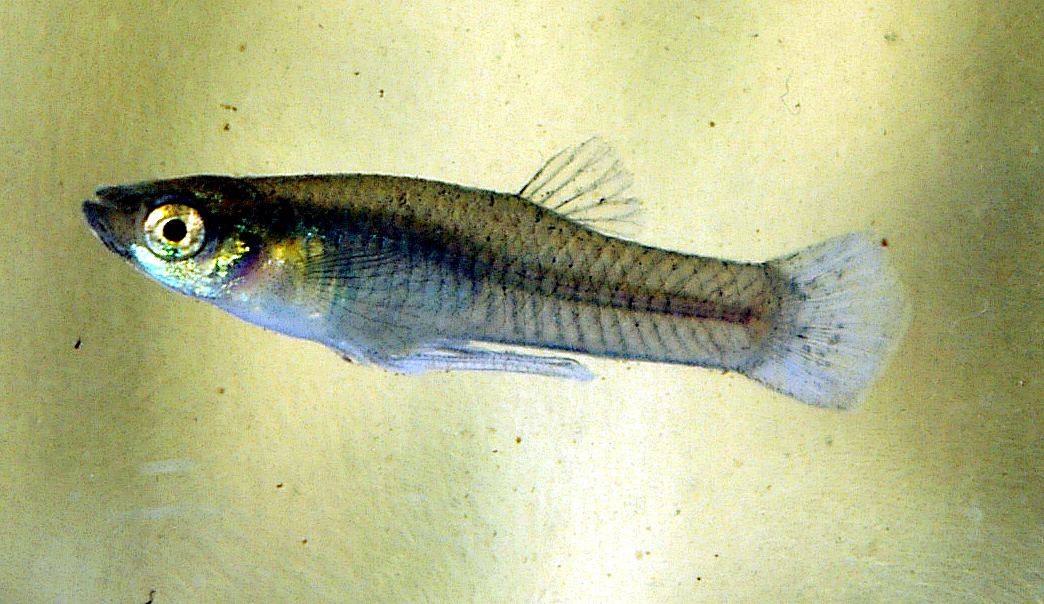 Gambusia affinis(kadayashi) male